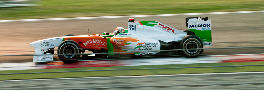 adrian Sutil GP Inde 2011